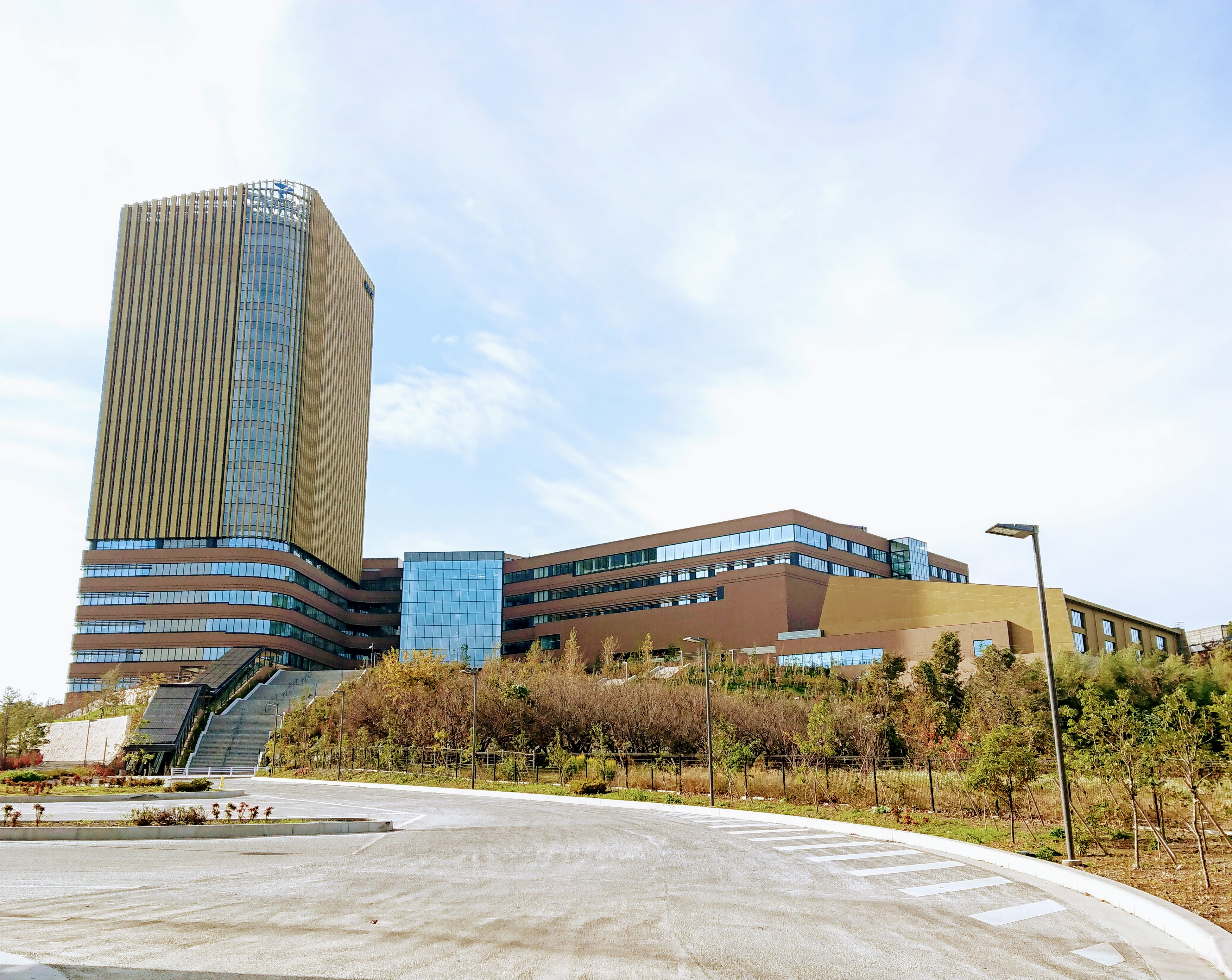 帝京大学八王子キャンパス ソラティオスクエア